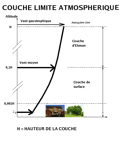 Image montrant la stratification de la couche limite planétaire depuis l'atmosphère libre où le vent est géostrophique jusqu'à la surface.Produite avec KPAINT dans Linux